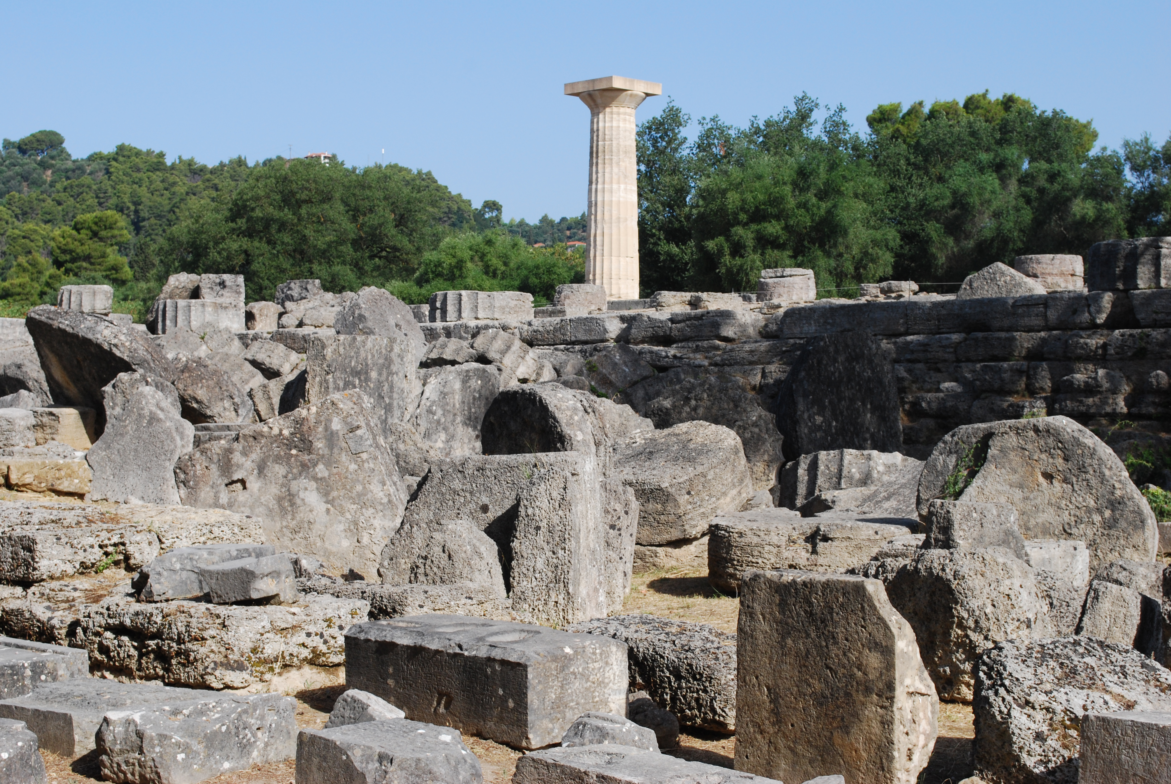 Olympie : temple de Zeus, côté Sud.